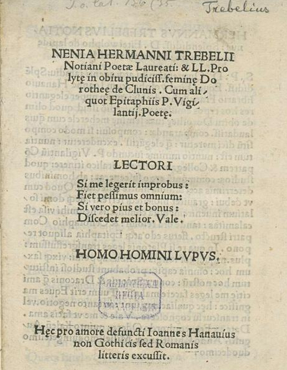 Nenia in obitu pudiciss. femine Dorotheae de Clunis, 1512, Hermannus Trebelius (1475-1515)